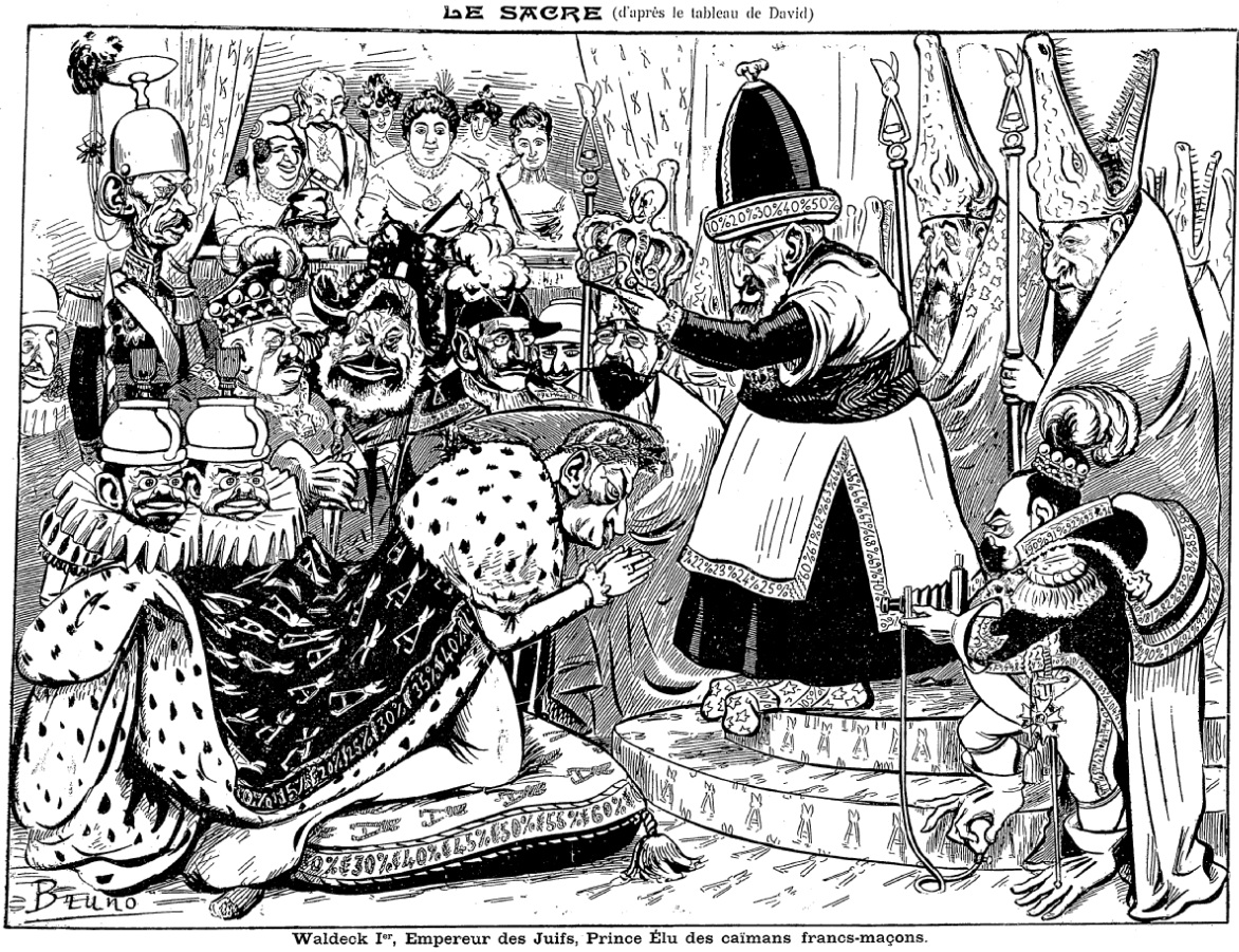 "Le Sacre (d'après le tableau de David). Waldeck Ier, Empereur des Juifs, Prince Élu des Caïmans francs-maçons."